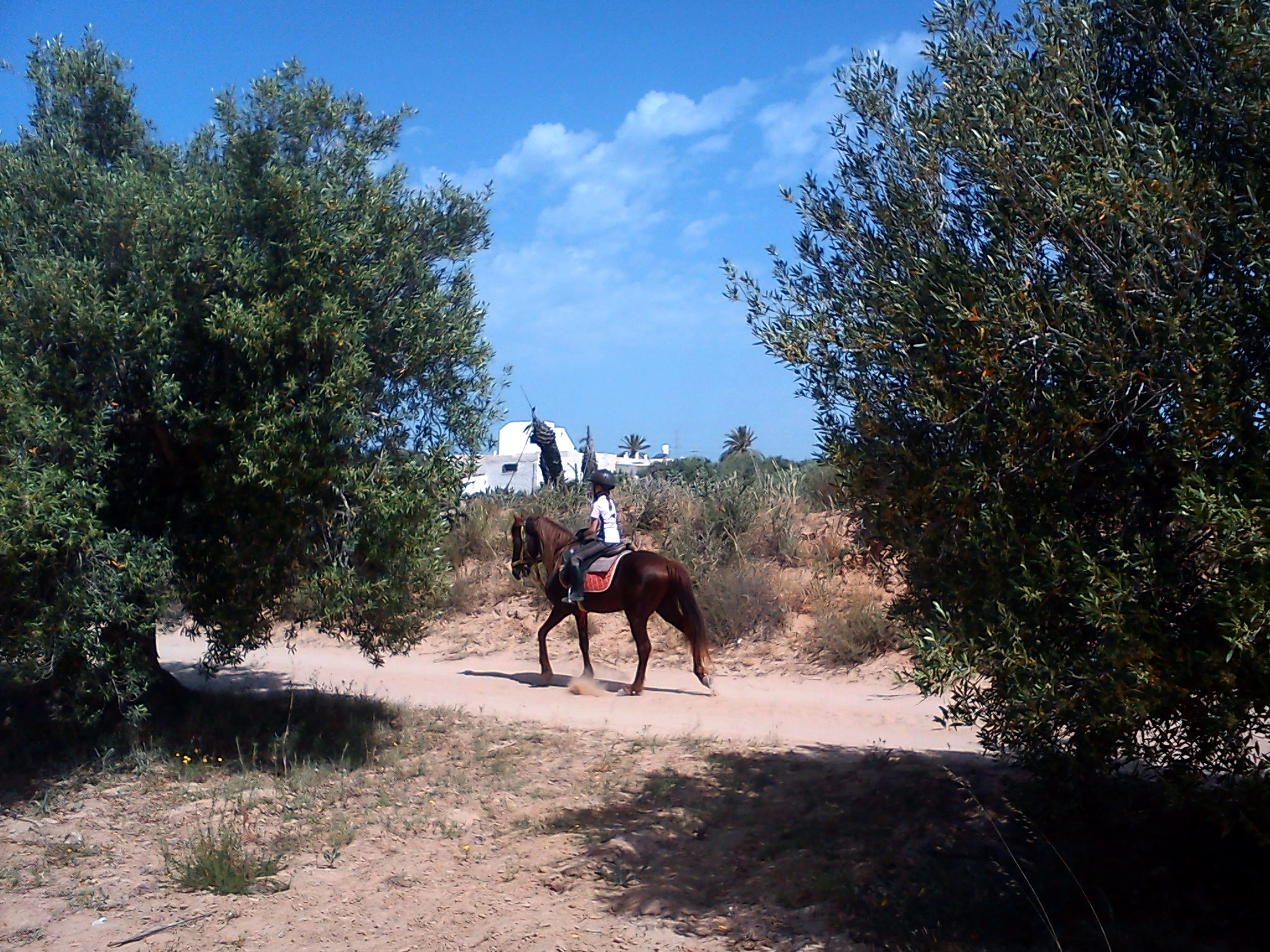 Une fillette qui fait de l'équitation dans les pistes de Mezraya